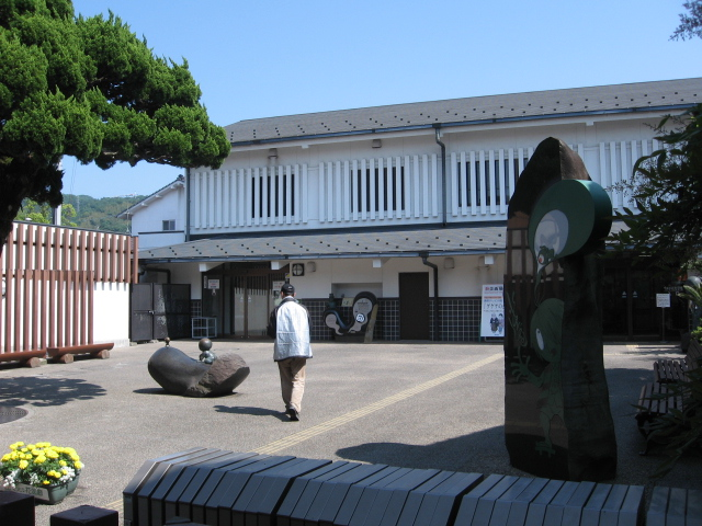 水木しげる記念館（鳥取県境港市）